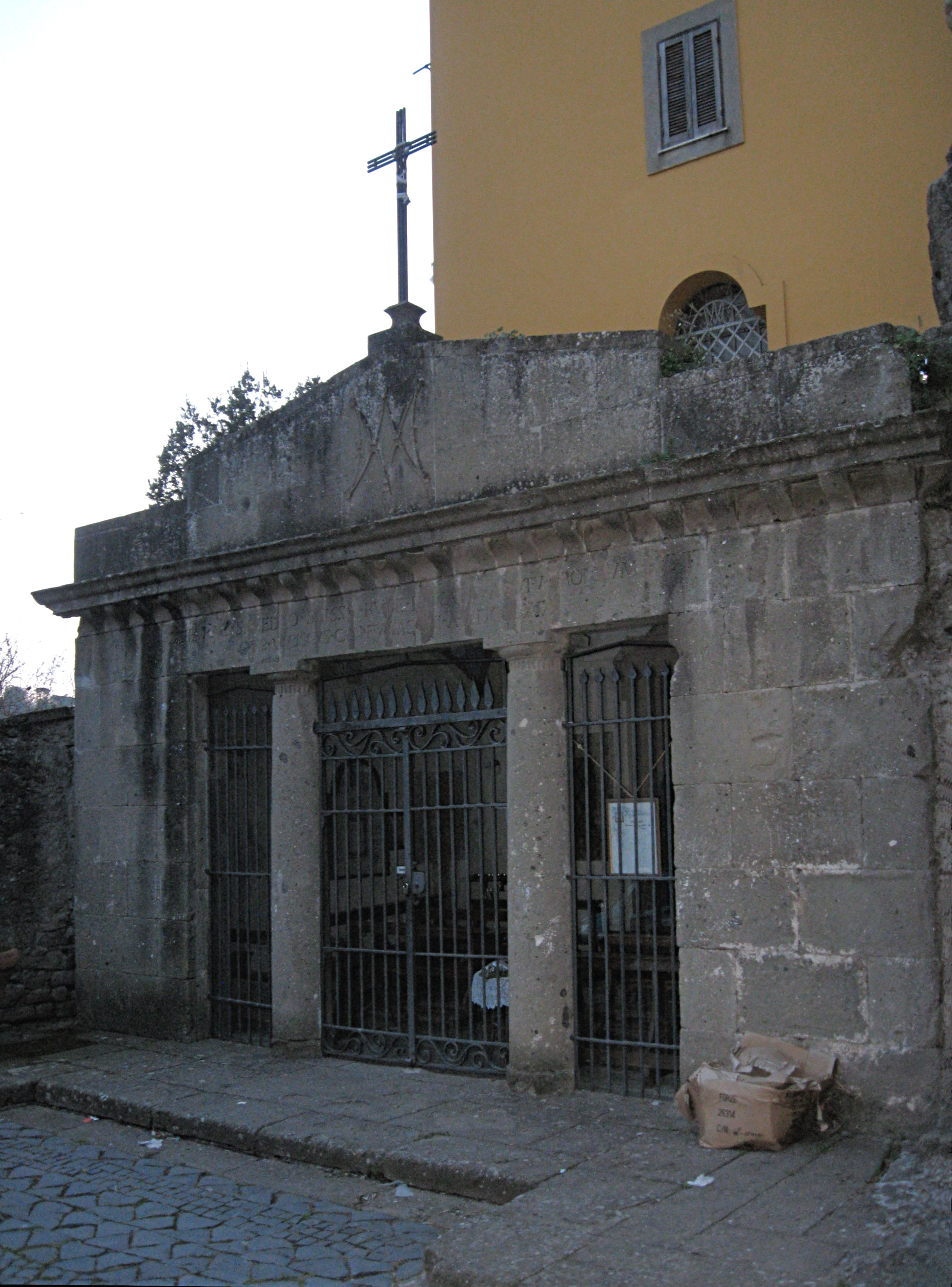 La facciata del santuario dell'Acquasanta di Marino (RM)